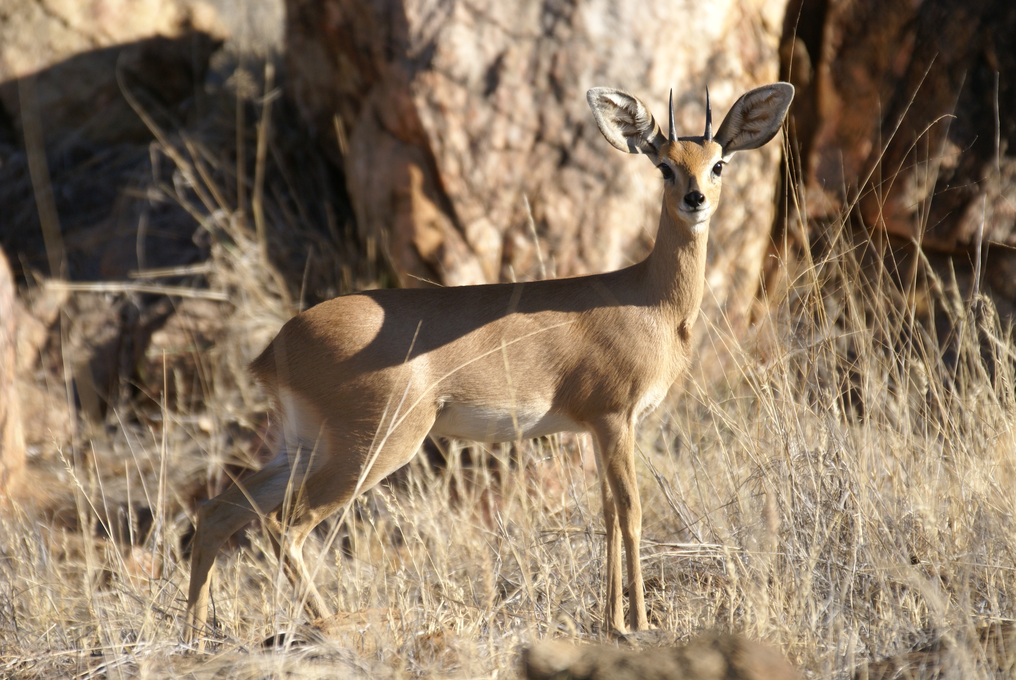 Steenbock male in Namibia